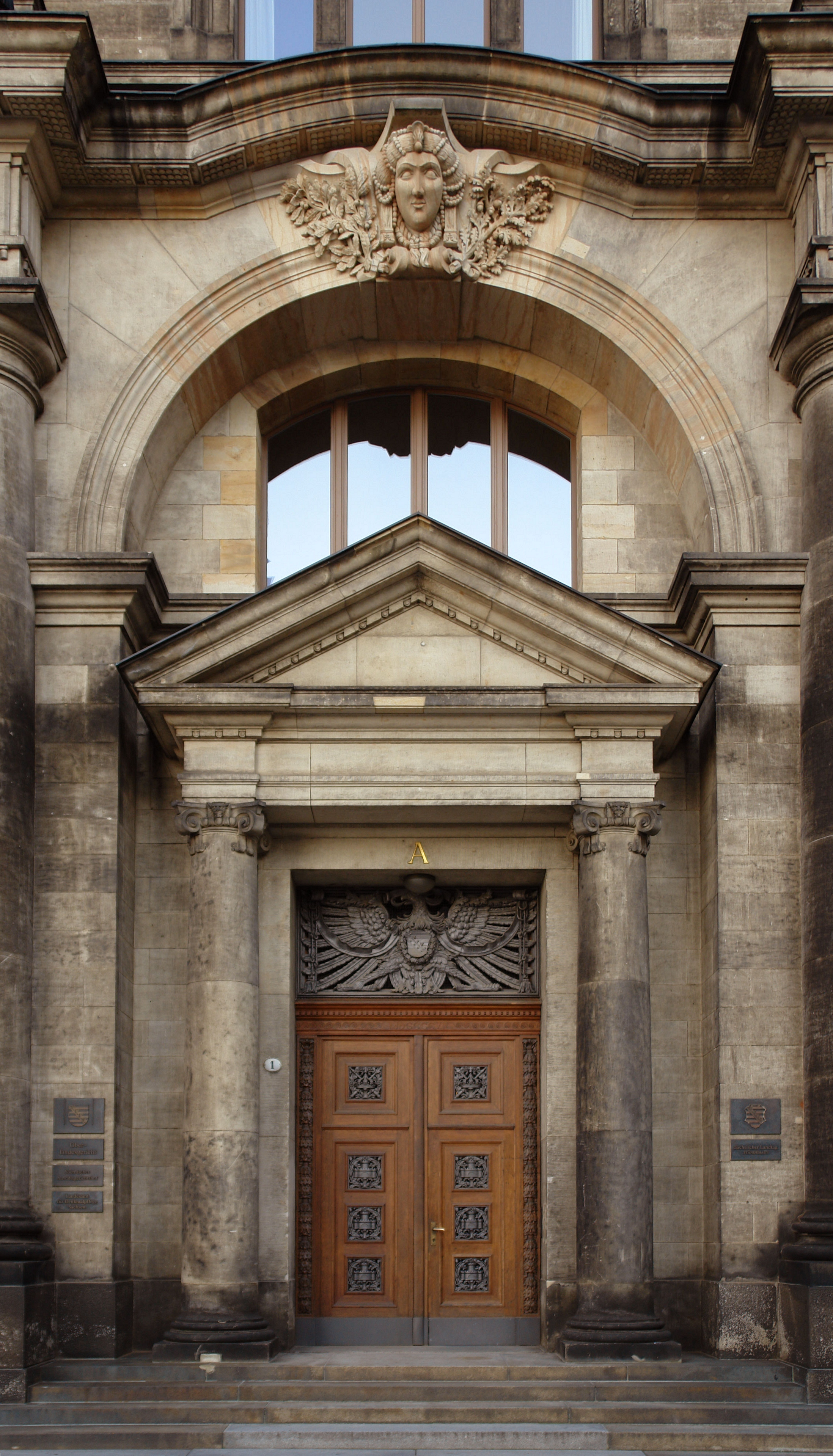 Eingangstür Sächsisches Ständehaus